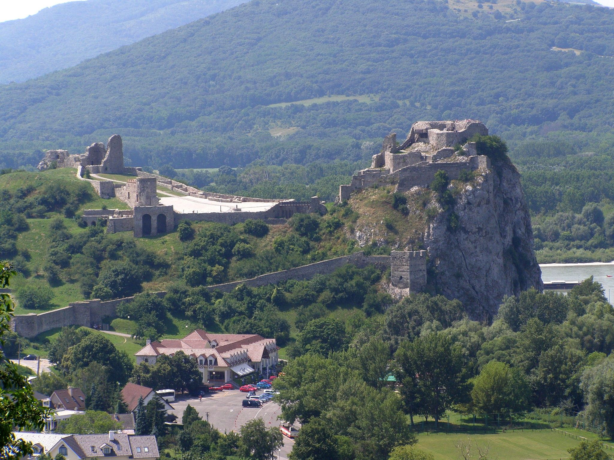 Pohľad na Devínsky hrad z Devínskej Kobyly